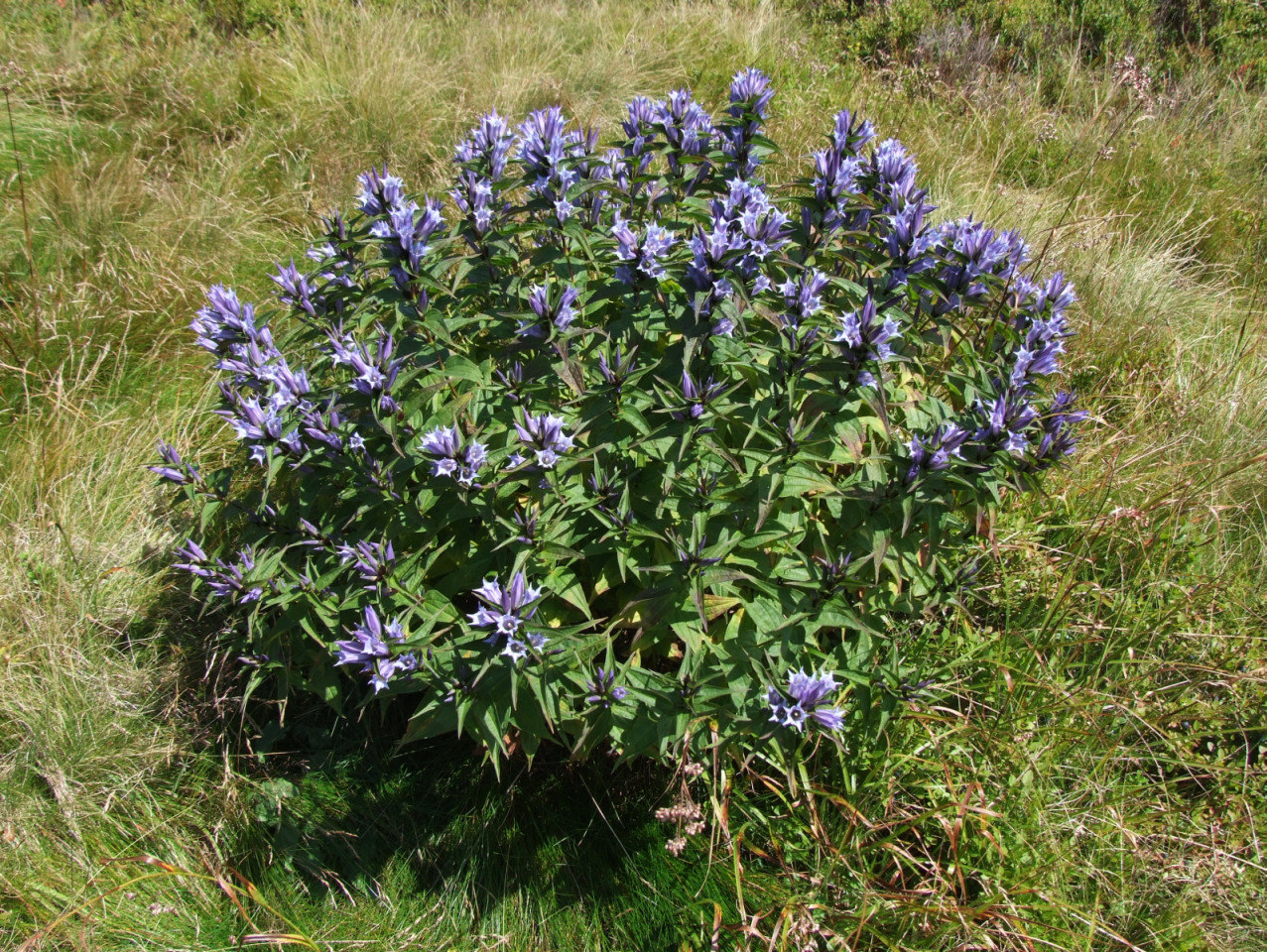 Gentiana asclepiadea